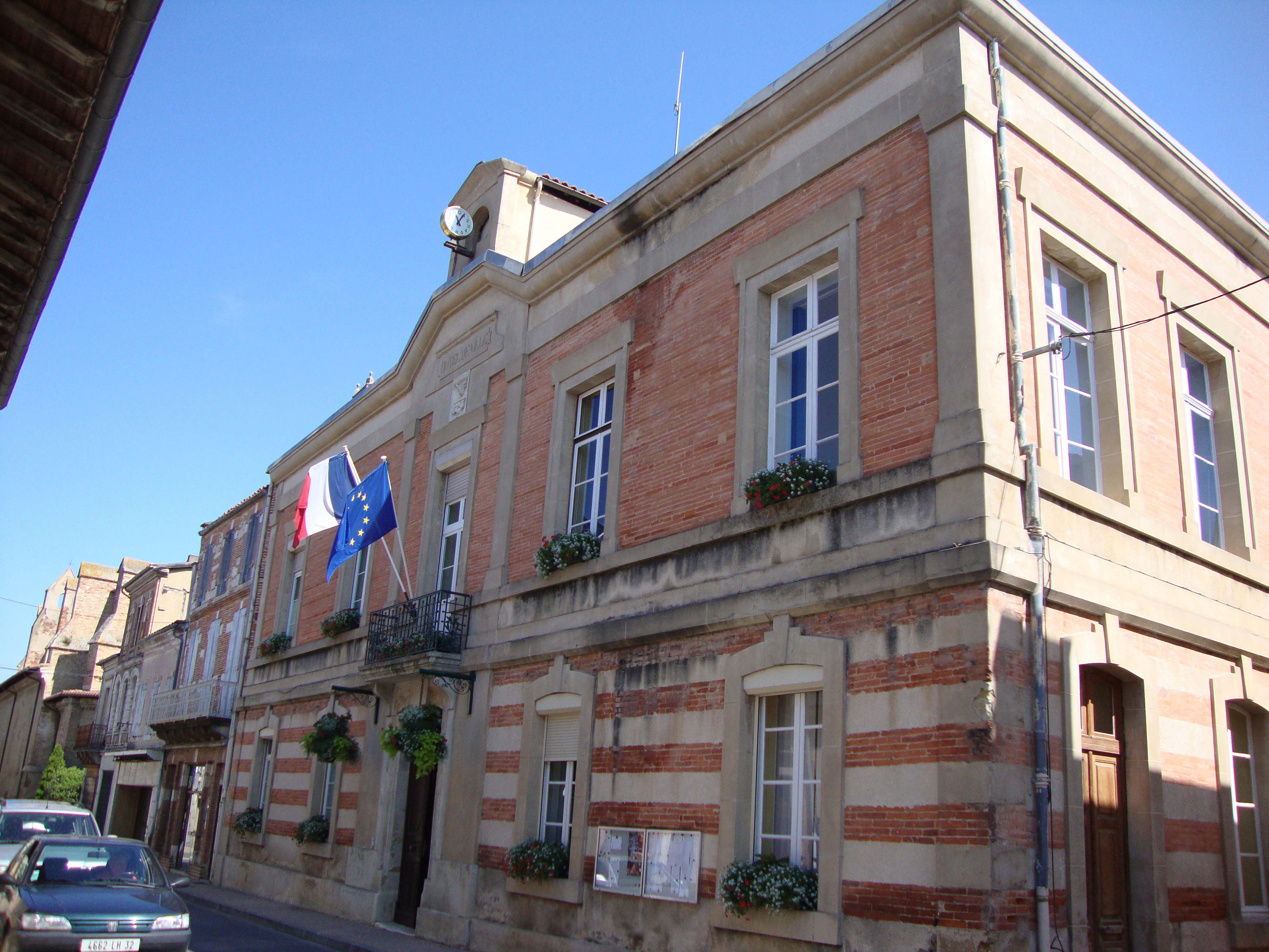 Gimont (Gers, Fr) mairie